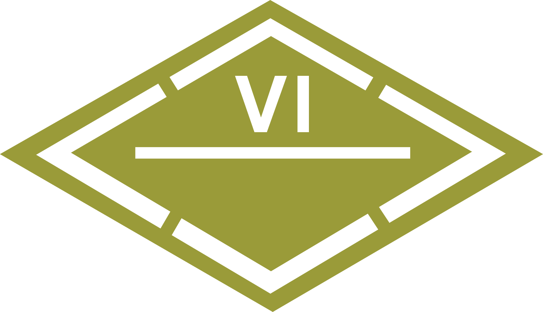 Znak na pojazdach 5 Pułku Artylerii Przeciwlotniczej